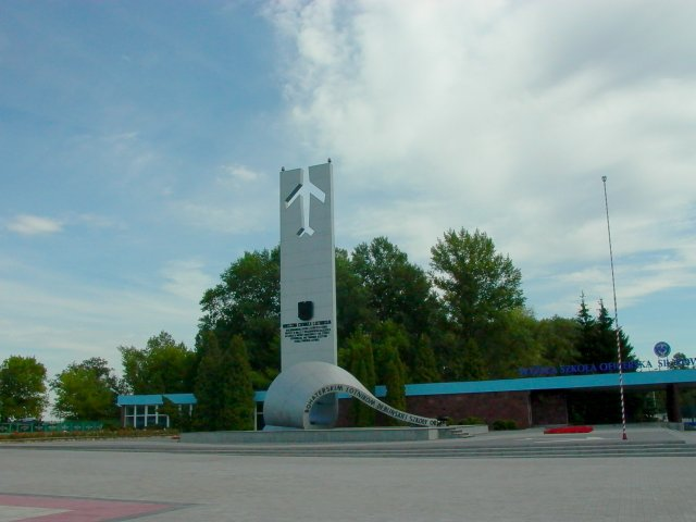 Denkmal der gefalenen Piloten der Dęblińskier Adler-Schule.